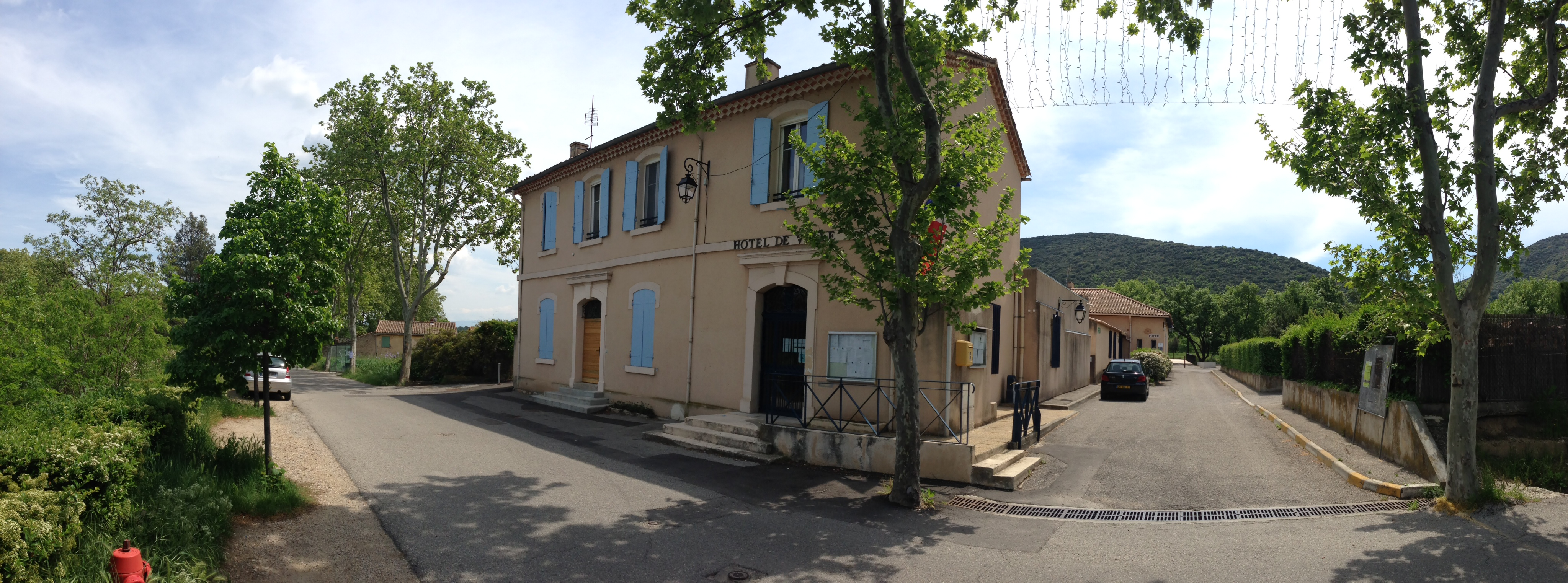 LA MAIRIE DE SAINT ESTEVE JANSON photographié par Yannick Grassi Saint-Estève-Janson 13610 FRANCE